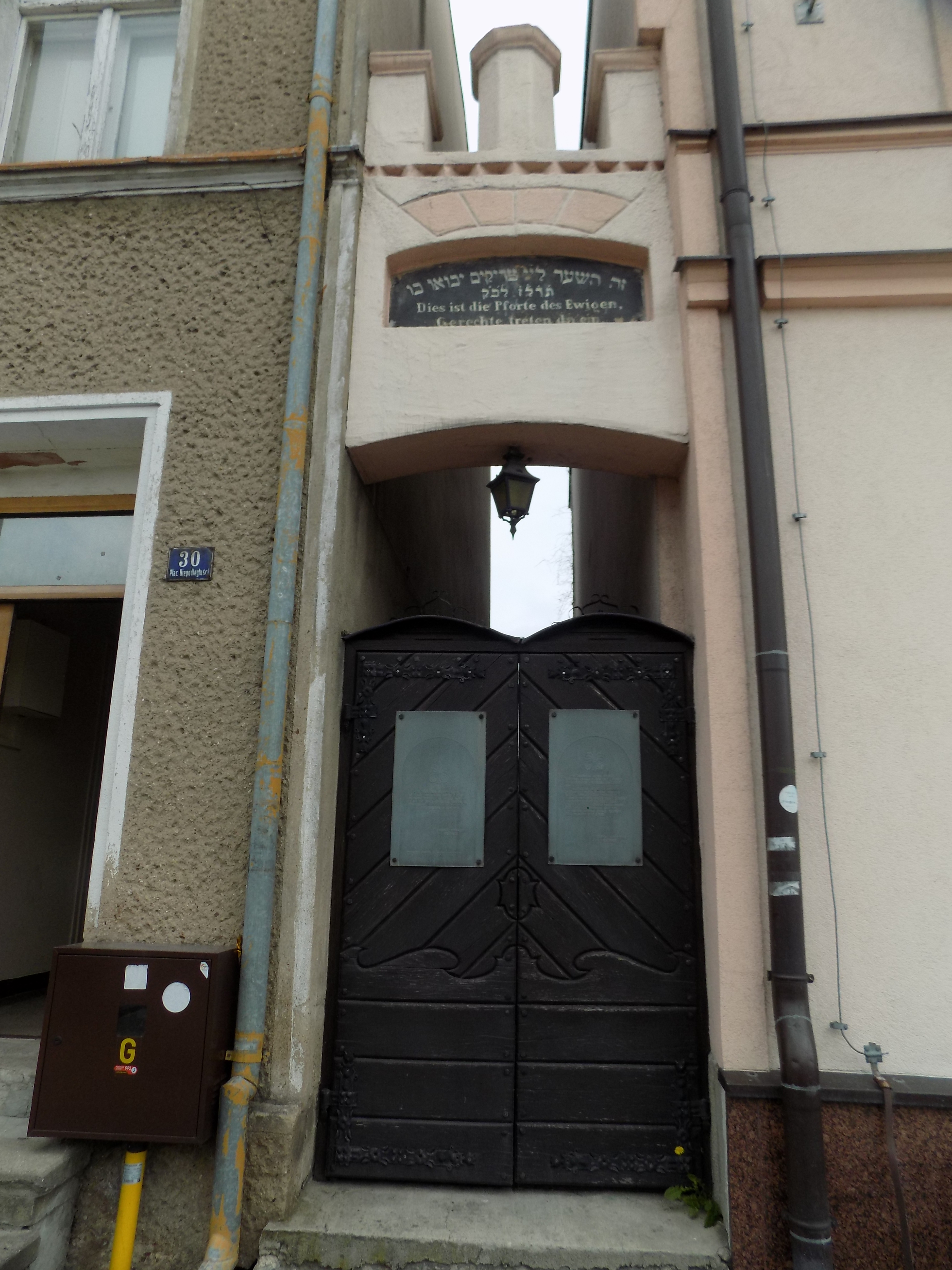 Plac Niepodległości w Kórniku, Ucho Igielne.